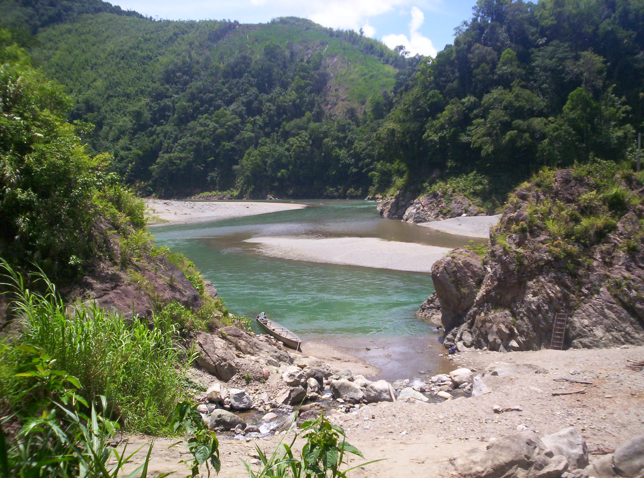 River in barangay of Dibagat, in Kabugao, Apayao province, Philippines.